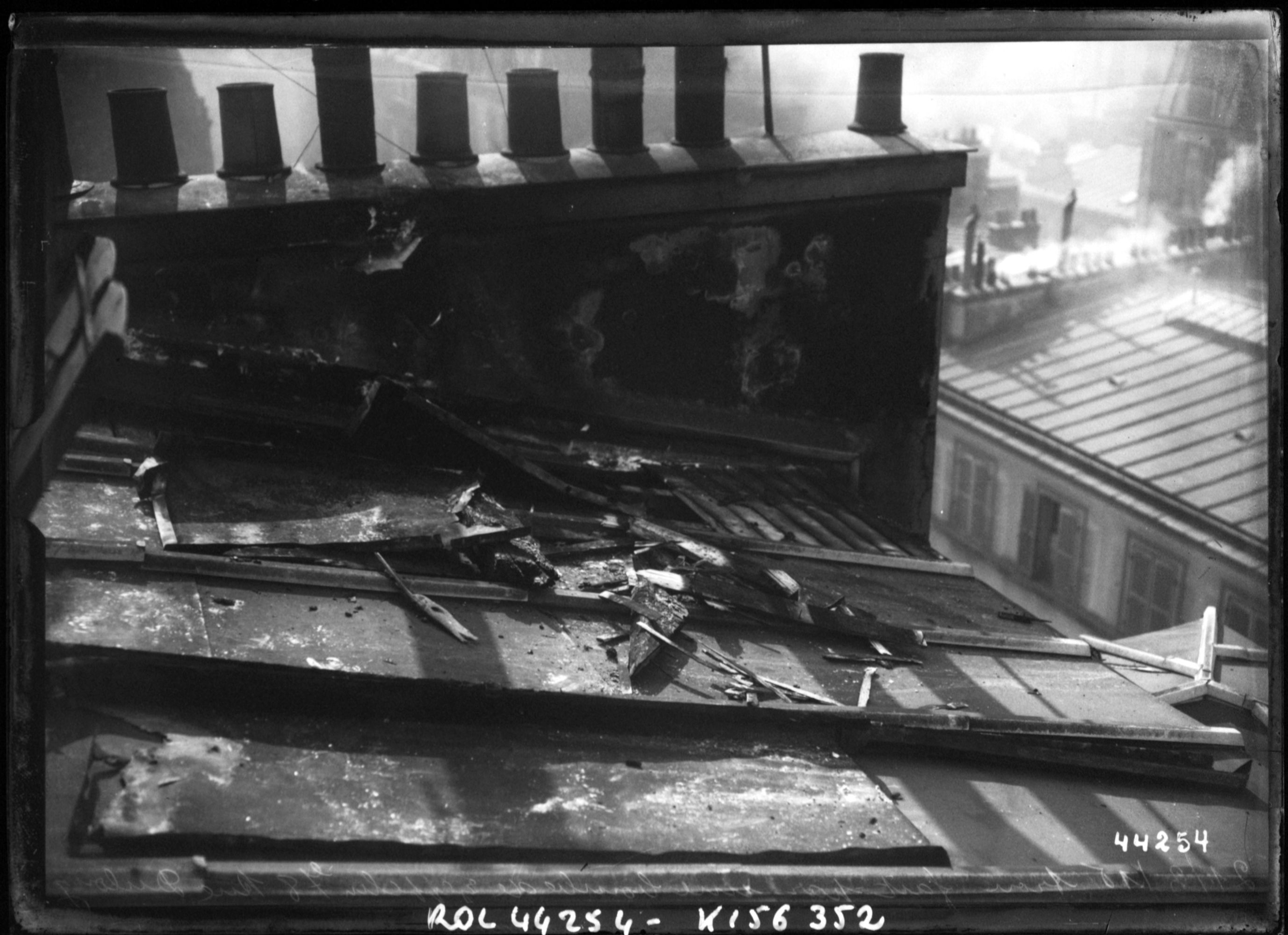 Dégâts causés dans le toit du 78 rue Dulong à Paris par une bombe lâchée par un Zepplin le 21 mars 1915.